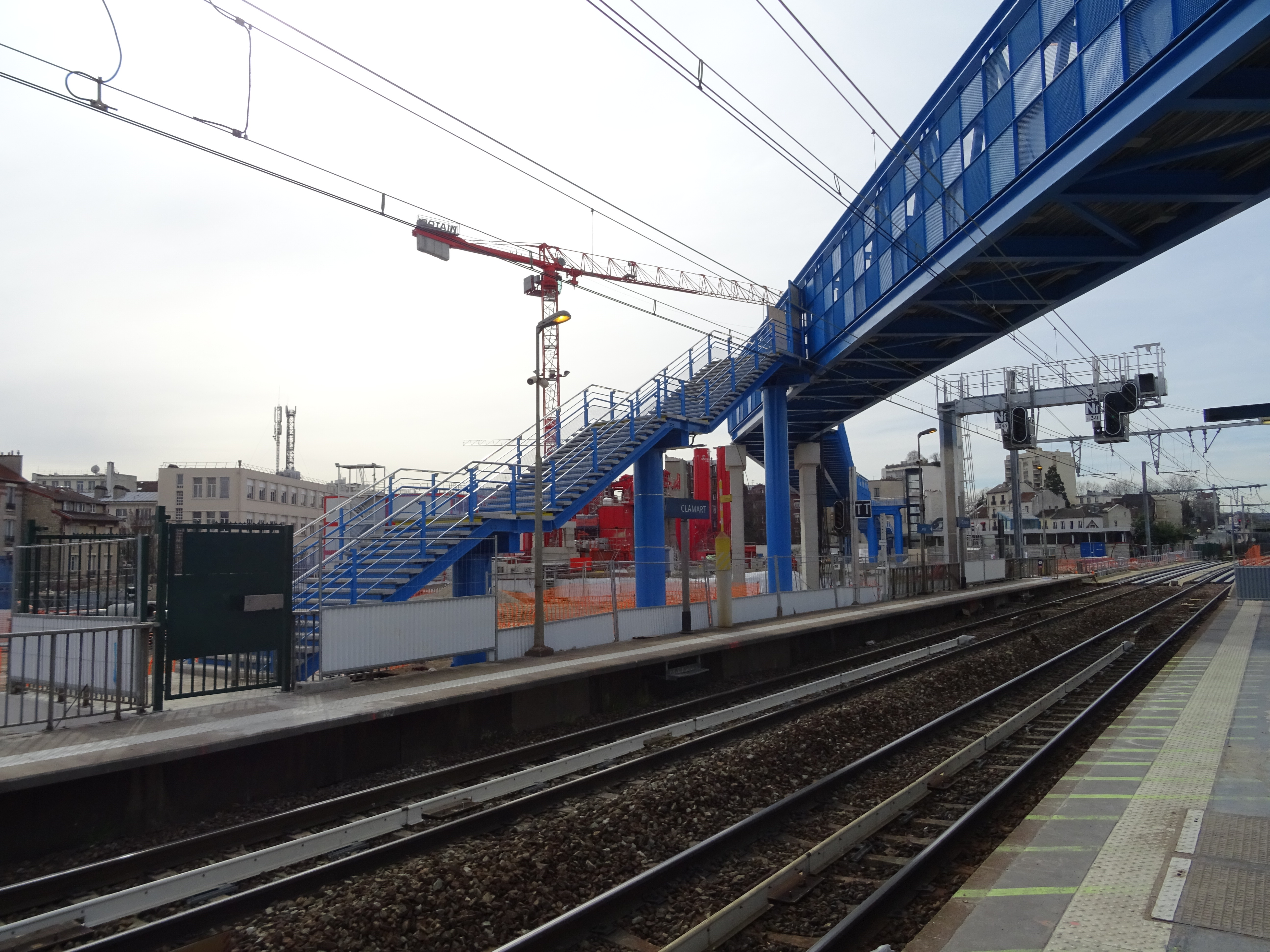 Voies et passerelle de la gare de Clamart vues depuis le quai central